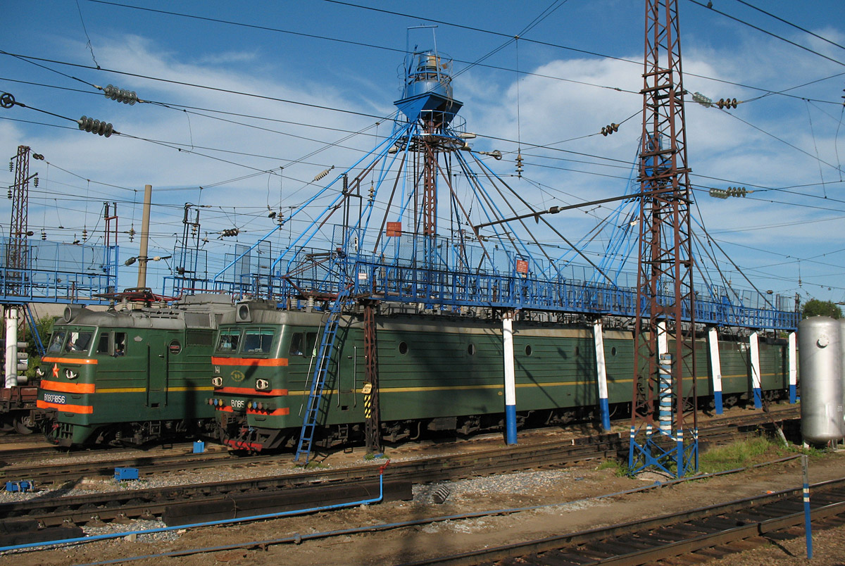 Электровозы ВЛ80Р-1856 и ВЛ85-141 Россия, Красноярский край, станция Иланская, ПТОЛ